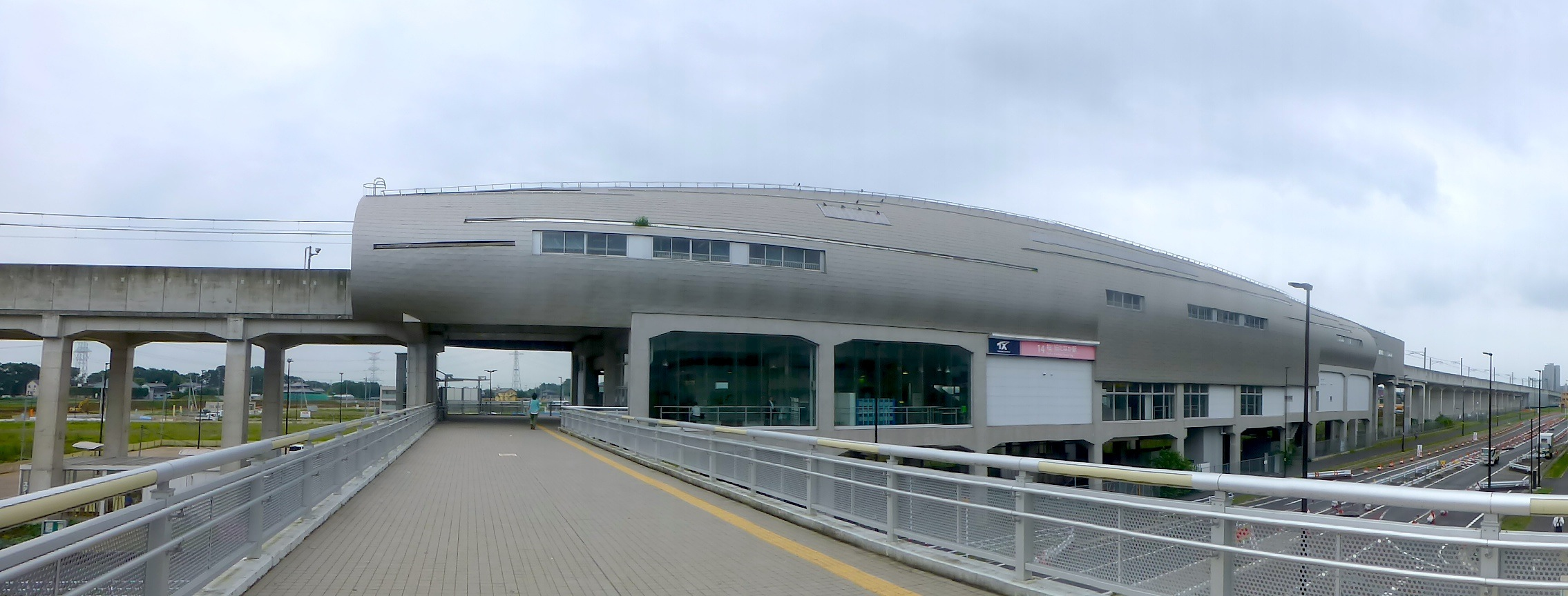 柏たなか駅 (Kashiwa-Tanaka Station)